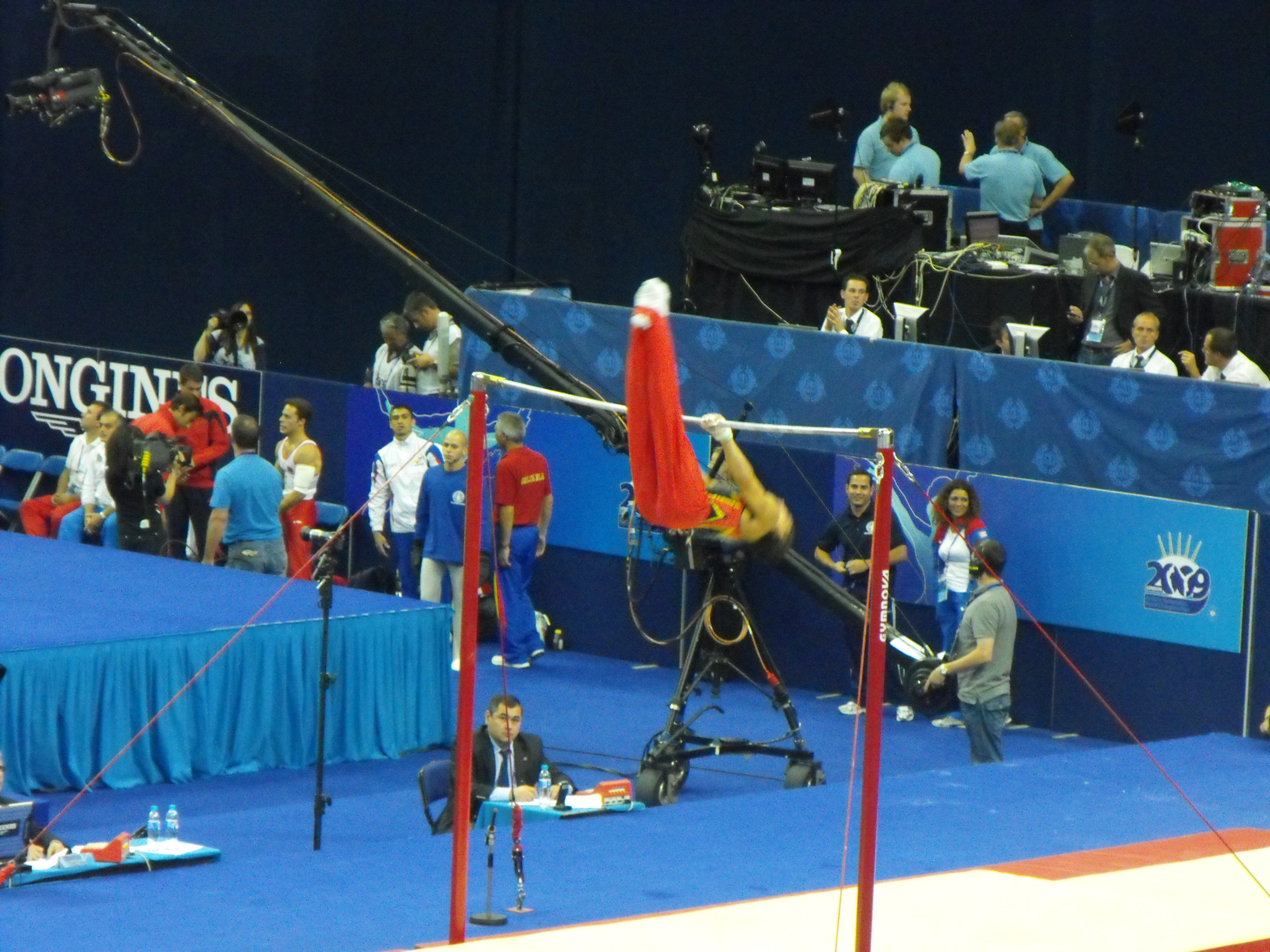 Mundial Londres